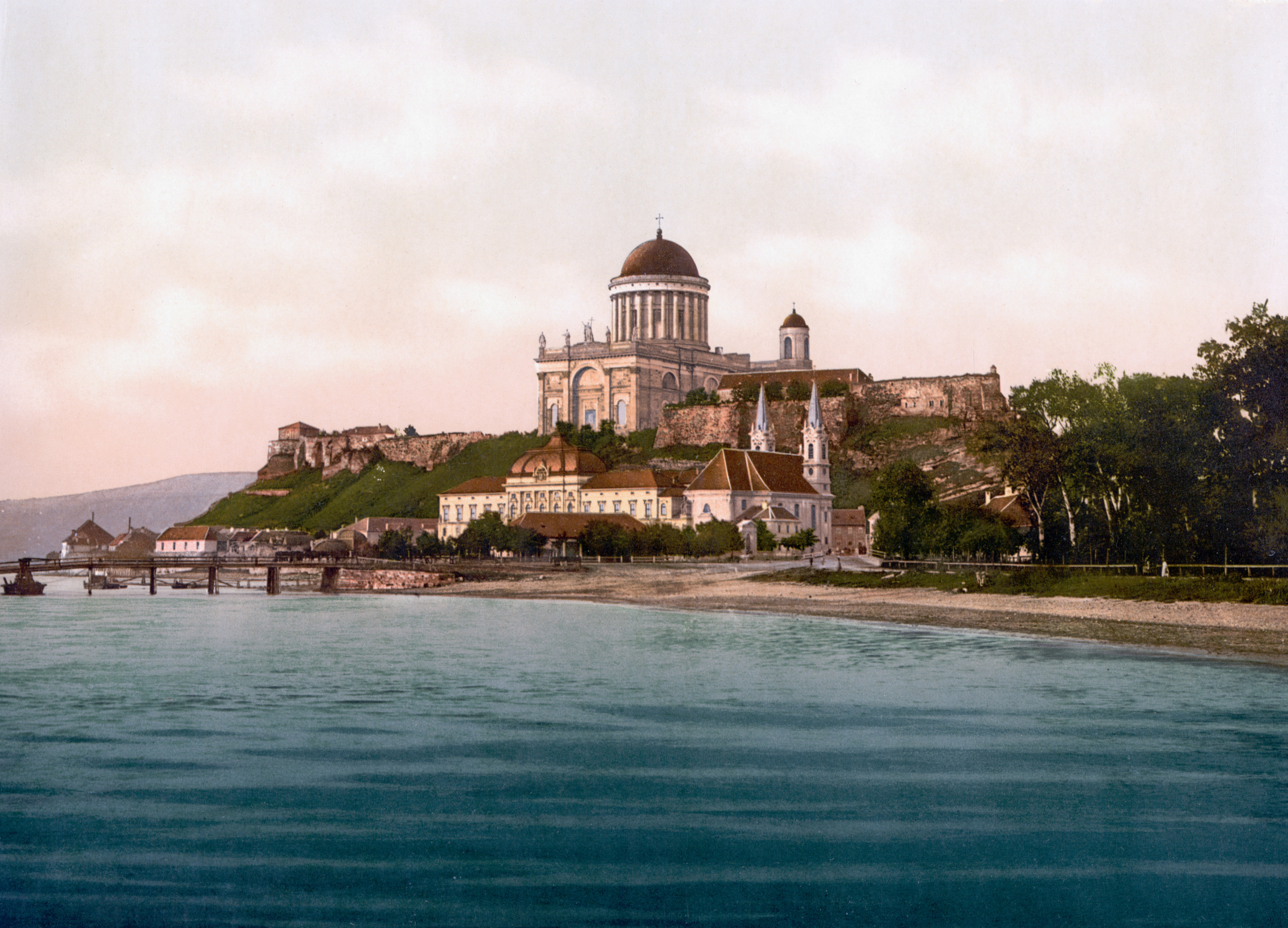 Esztergom (Gran) um 1900